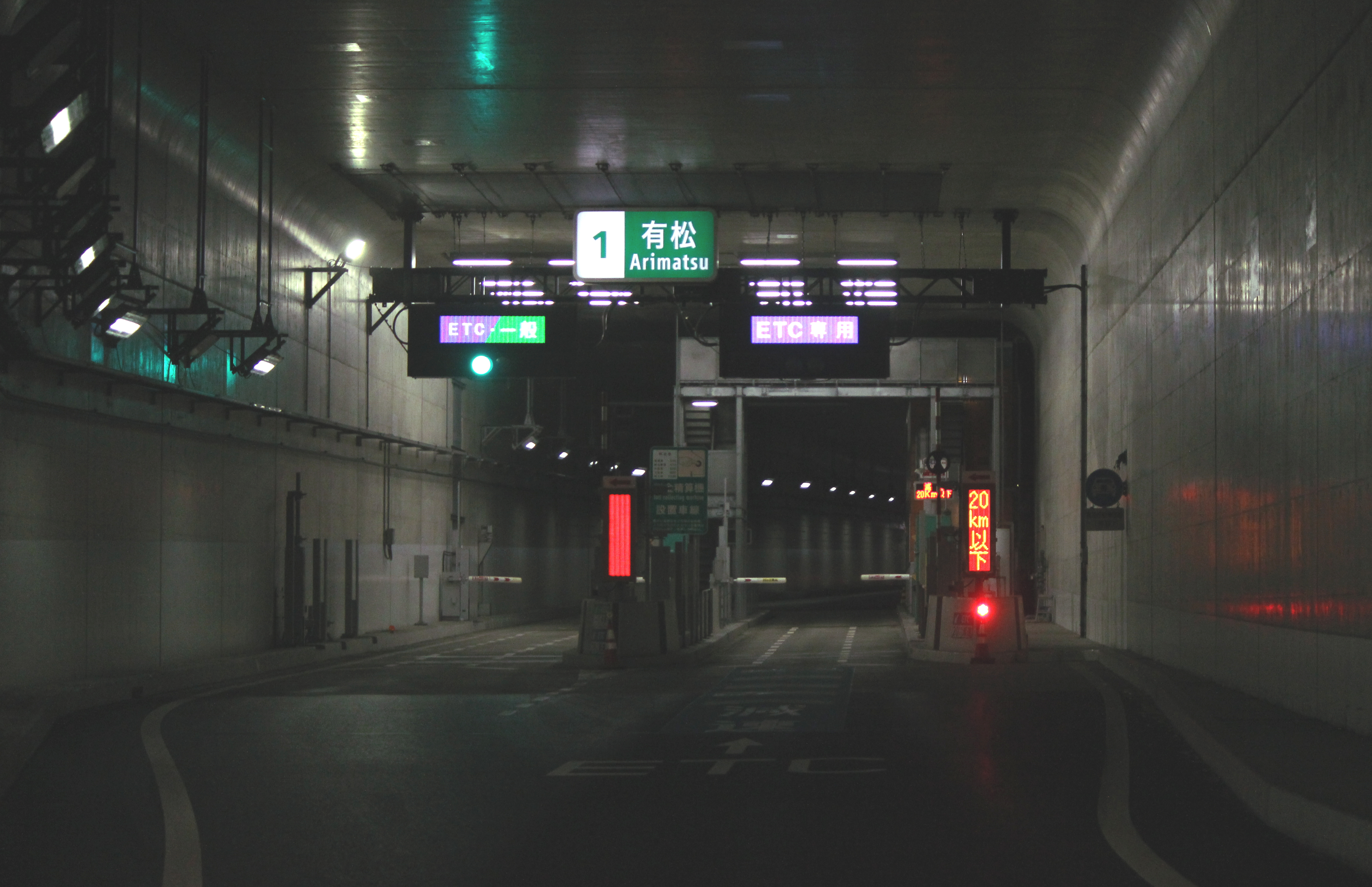 名二環 有松インターチェンジ料金所（名古屋南JCT方面）